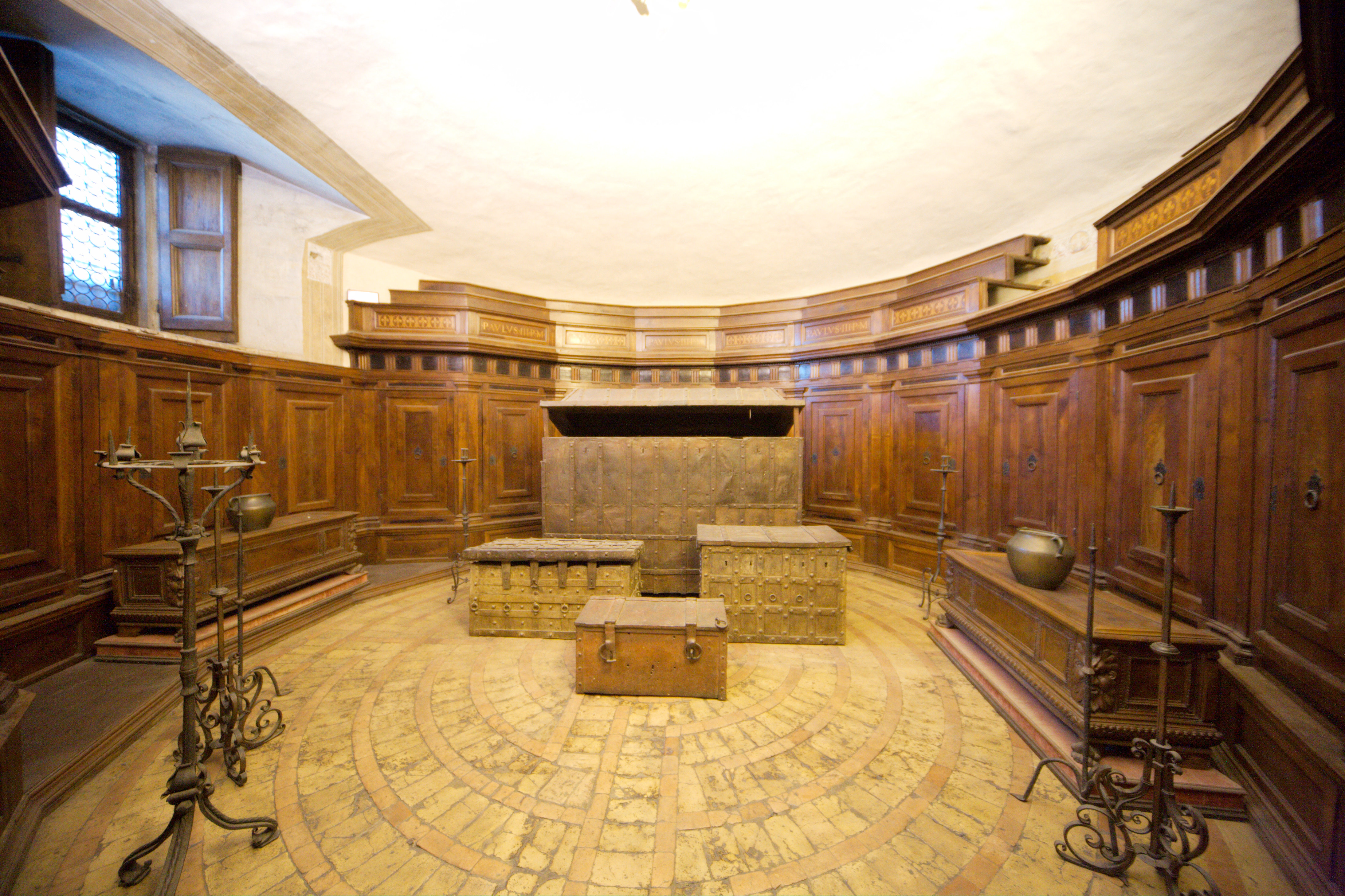 La "Stanza del Tesoro" papale in Castel Sant'Angelo, a Roma. Al centro, le casseforti blindate che contenevano il tesoro dello Stato della Chiesa